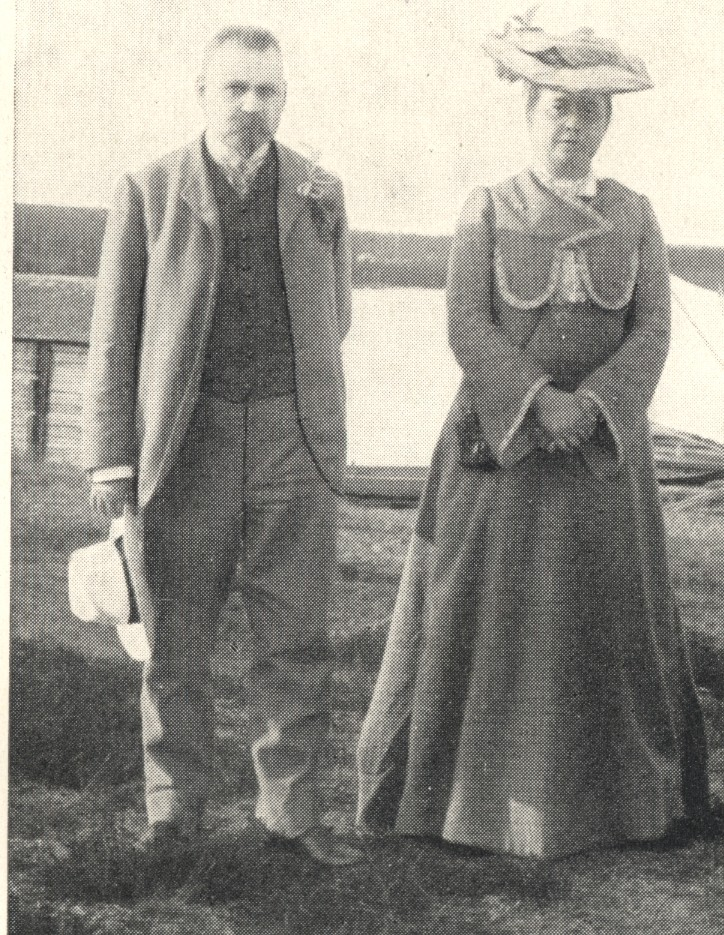 Matti Helenius-Seppälä ja Alli Trygg-Helenius Esitelmämatkalla Pohjois-Ruotsissa.